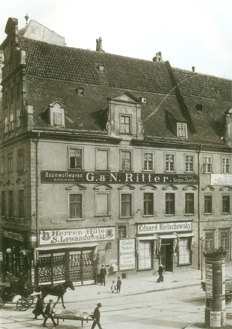 Wrocław Rynek 12 lata 1890-1903